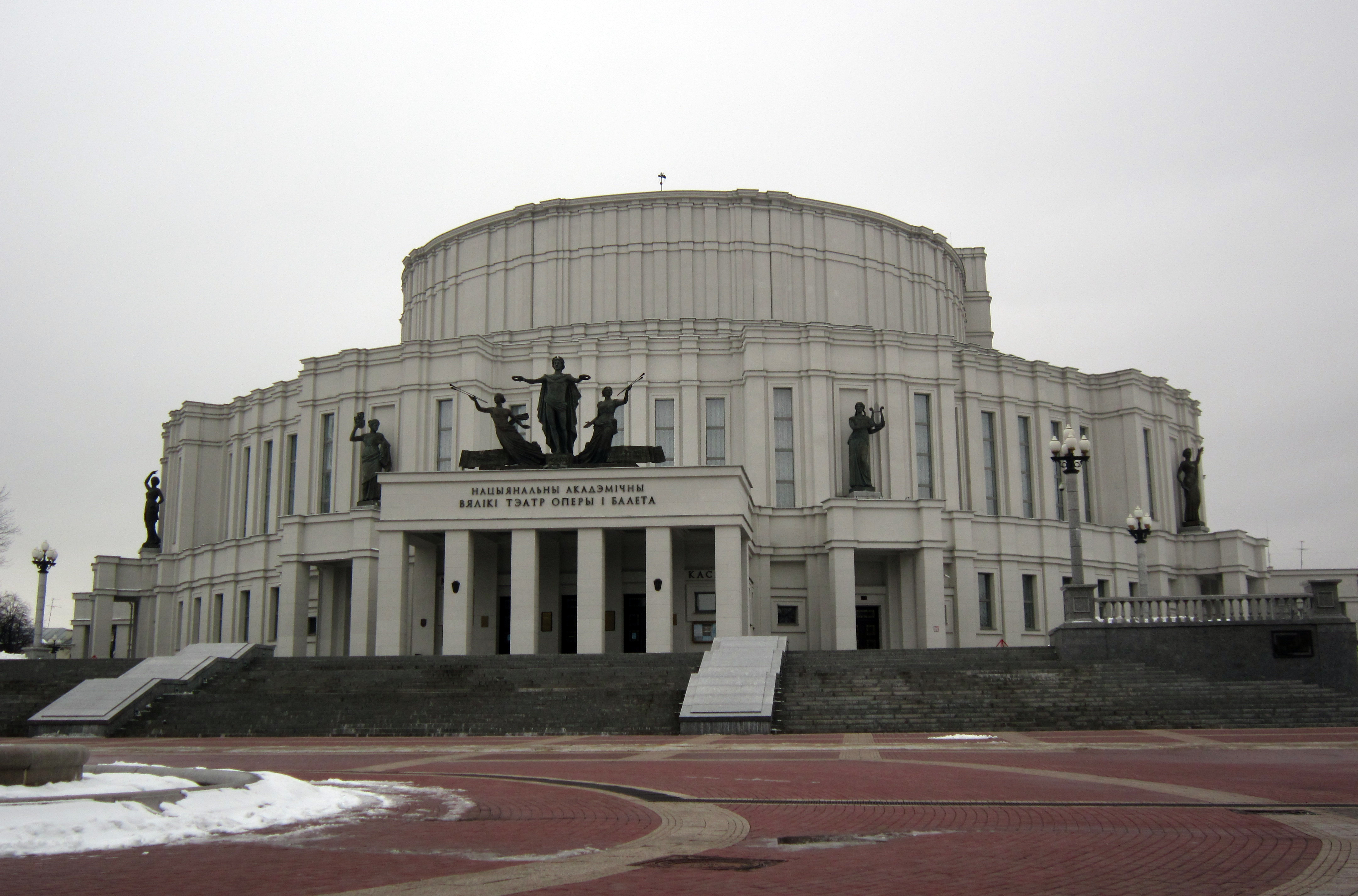 Национальный академический Большой театр оперы и балета Республики Беларусь